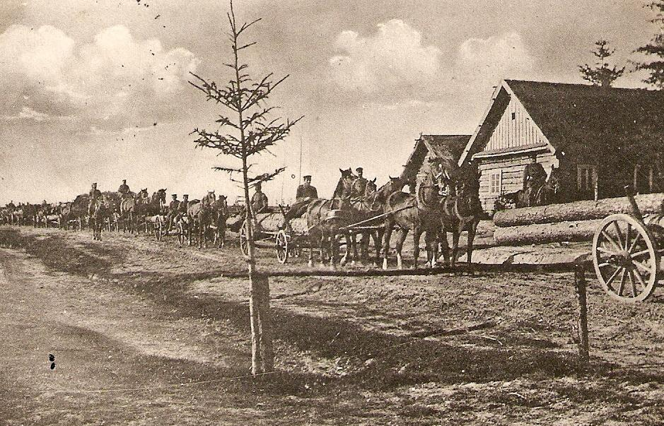 Żołnierze landsturmu transportujący drewno do umocnień we wsi Ulatowo Czerniaki w powiecie przasnyskim podczas I wojny światowej.